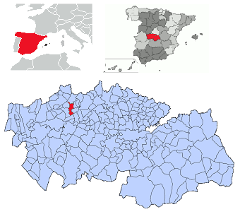 Castillo de Bayuela en la provincia de Toledo